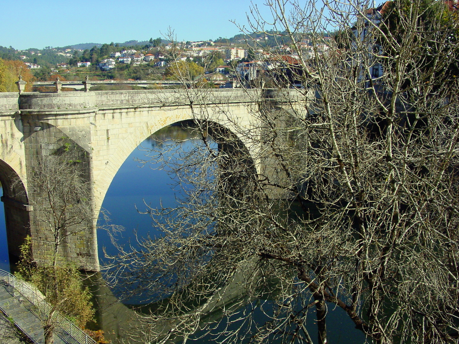 Ponte sobre o Tâmega